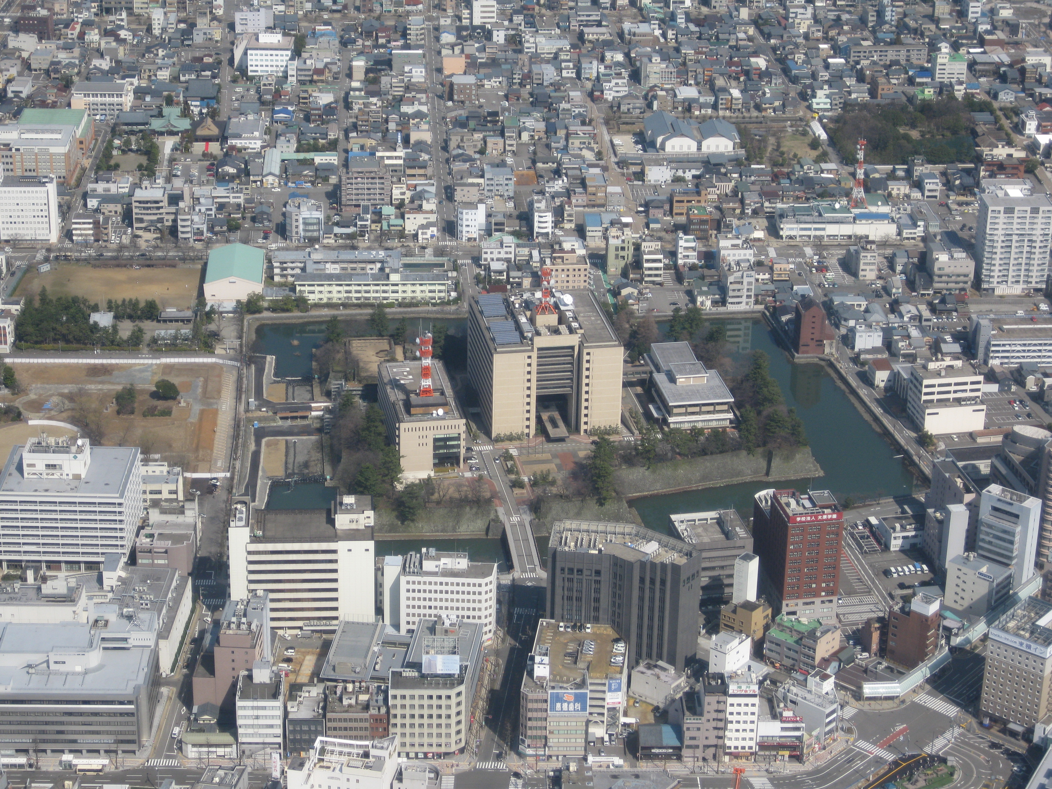 上空から撮影した福井県庁